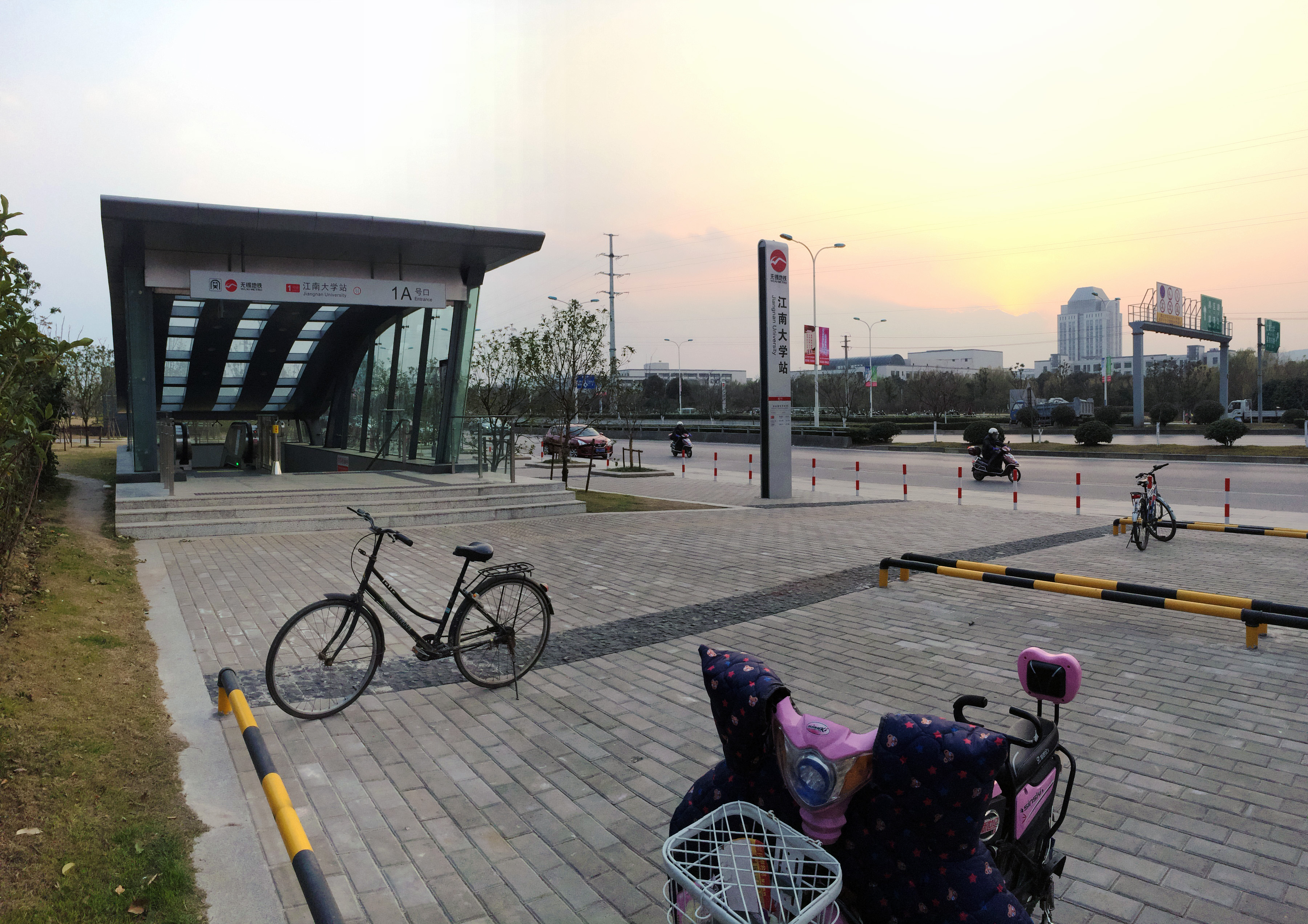 無錫地鐵江南大學站1A號出入口